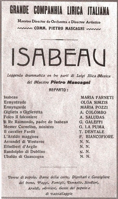 Locandina della Prima di Isabeau al Colon di Buenos Aires